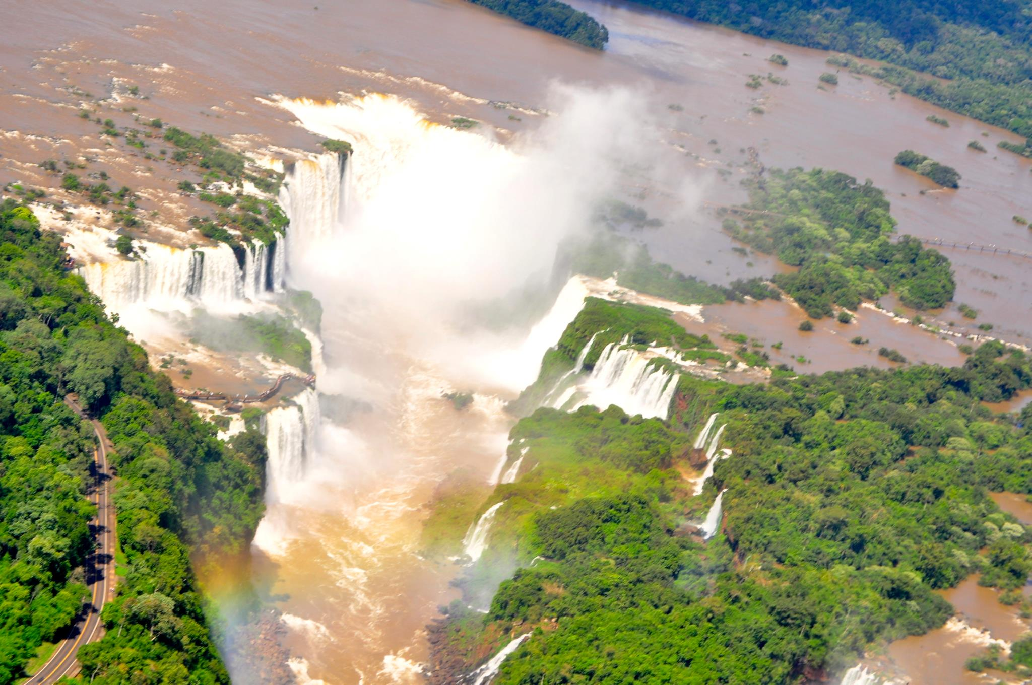 Foto aérea de Foz do Iguaçu